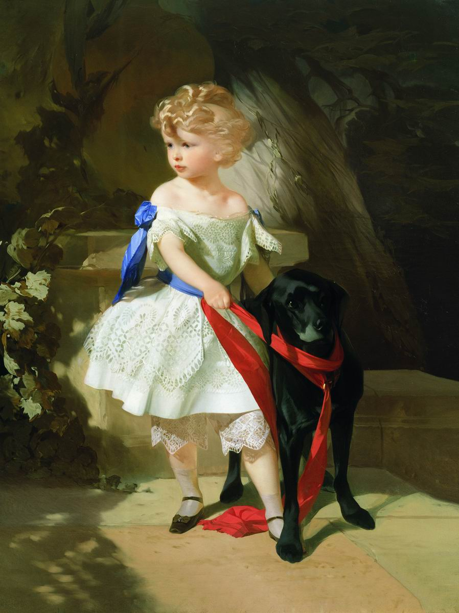 Иван Макаров. Девочка с собакой. 1860-е. ГРМ. В собрании ГРМ находится портрет работы Макарова, поступивший из дворца Строгановых, традиционно называющийся "Девочка с собакой", хотя изображает мальчика. Можно утверждать, что это Сергей Александрович Строганов (1852-1923). Вероятно, портрет является парным к "Портрету девочки" (ГИМ), предположительно изображающему его сестру Ольгу.